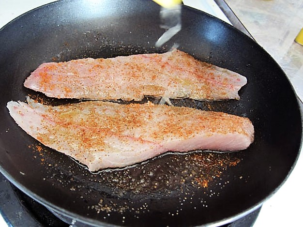 Braten von gewürzten und mit Zitronensaft marinierten Fischfilets in einer Pfanne.